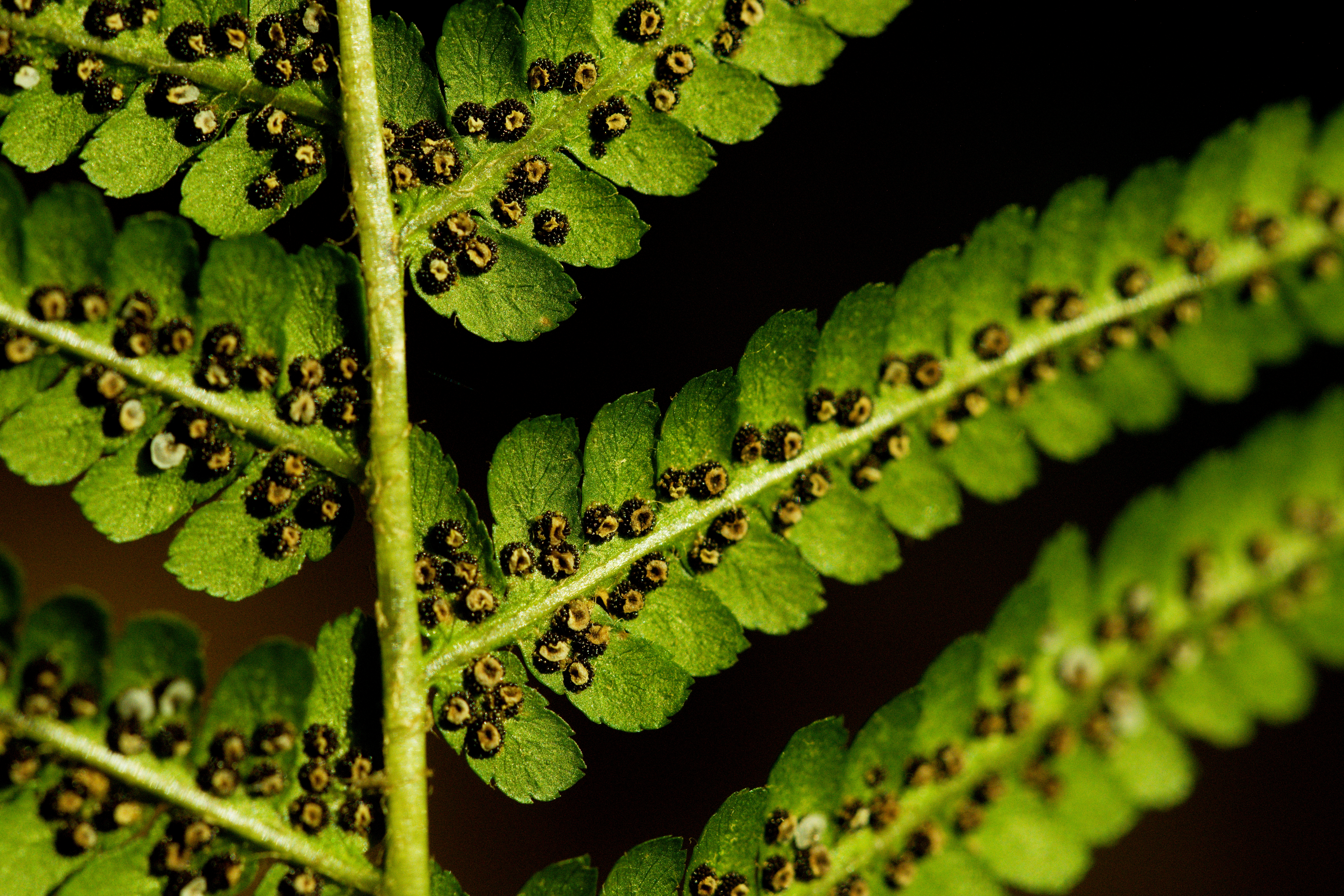 Spory kapradin